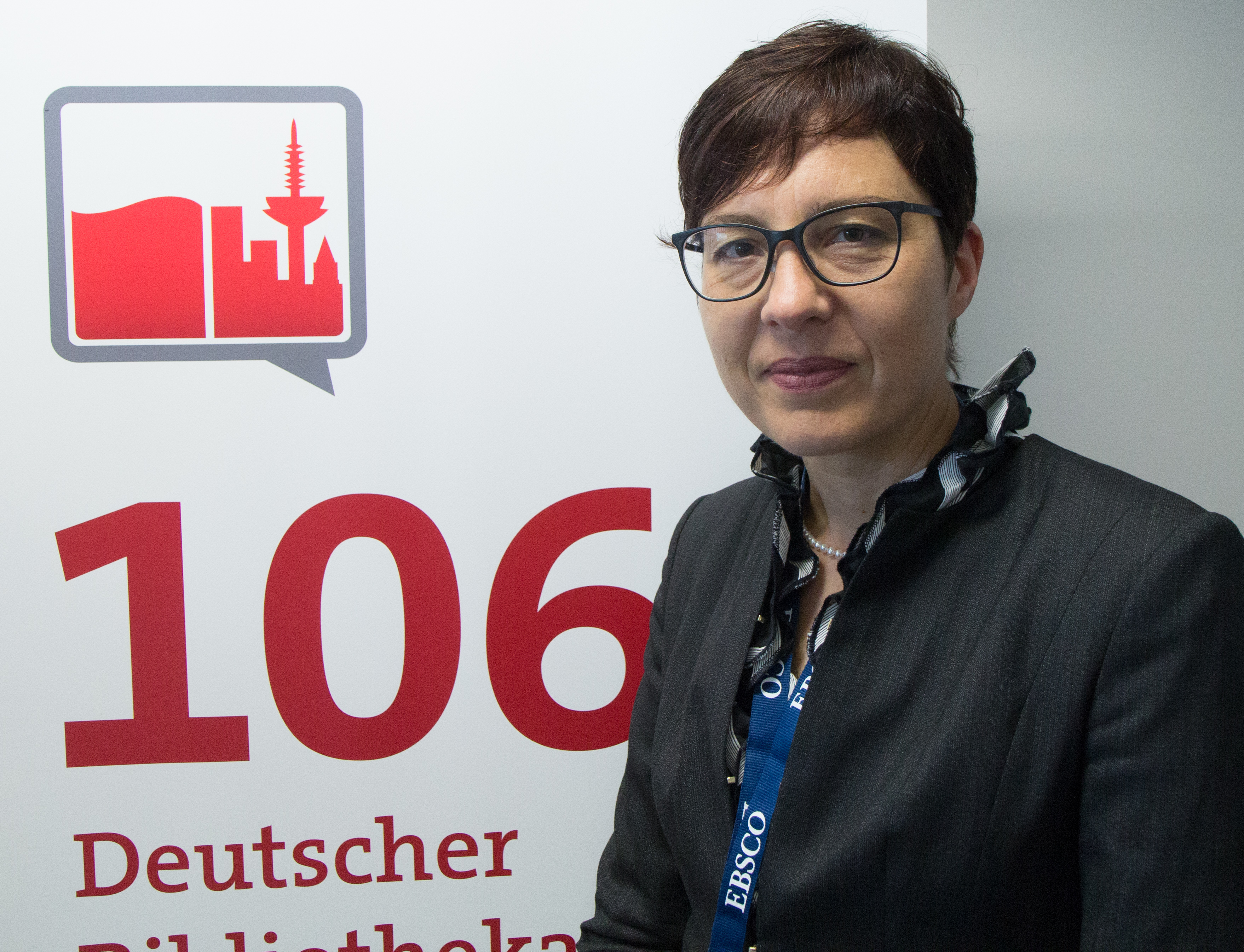 Konstanze Söllner, Vorsitzende des Vereins Deutsche Bibliothekarinnen und Bibliothekare e.V. (VDB)